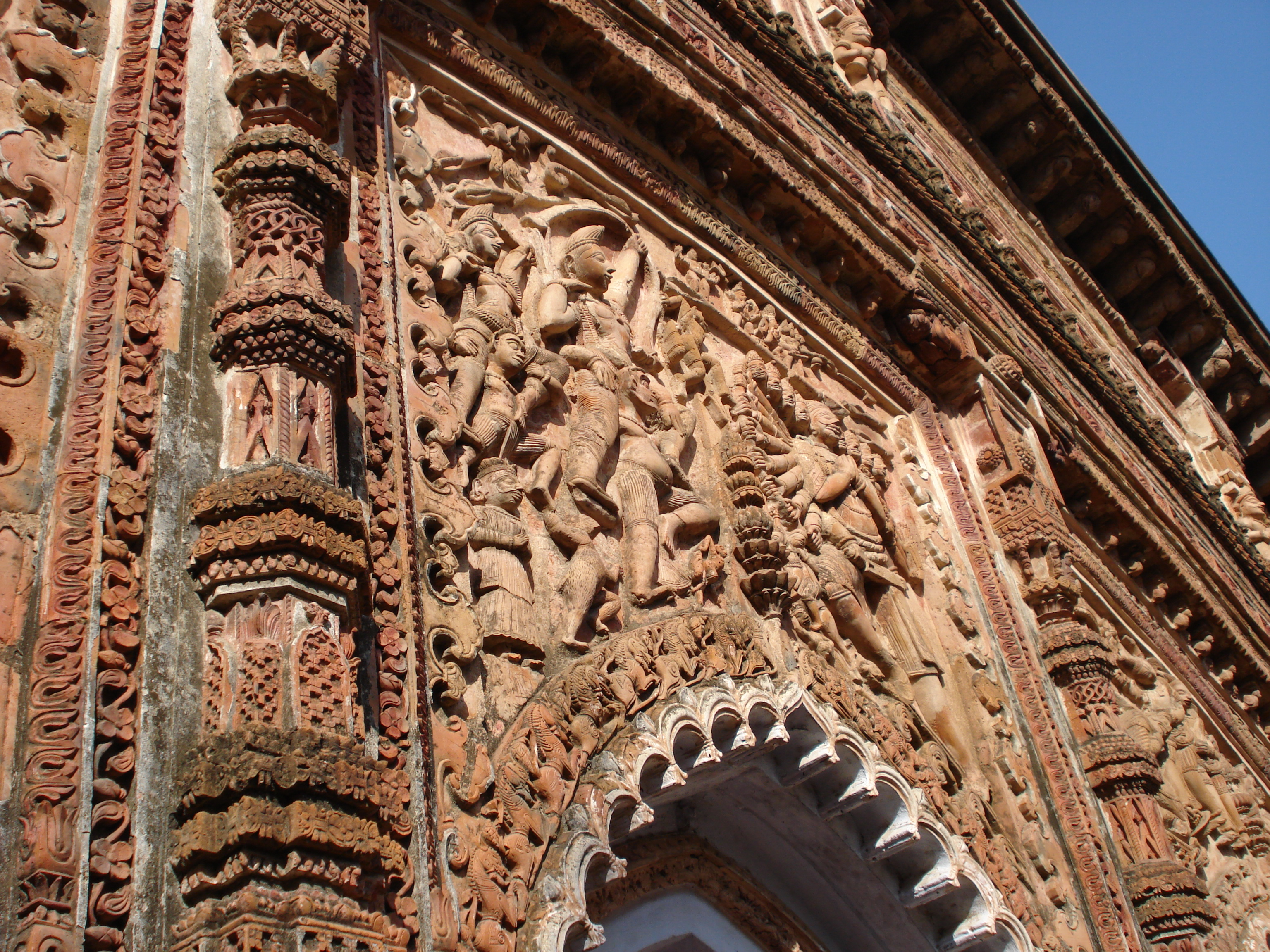 মুর্শিদাবাদের চারবংলা মন্দিরগাত্রে টেরাকোটার কাজ